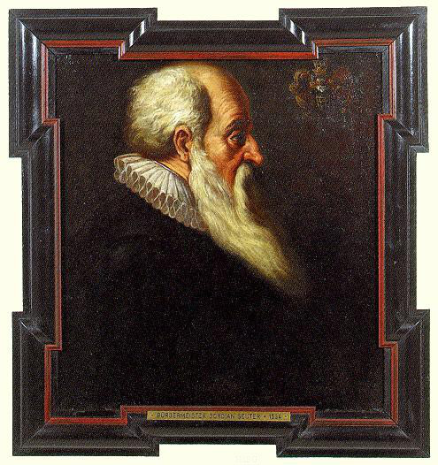 Gordian Seuter, Bürgermeister von Kempten, Verhandler des "Großen Kaufs", gestorben 1534